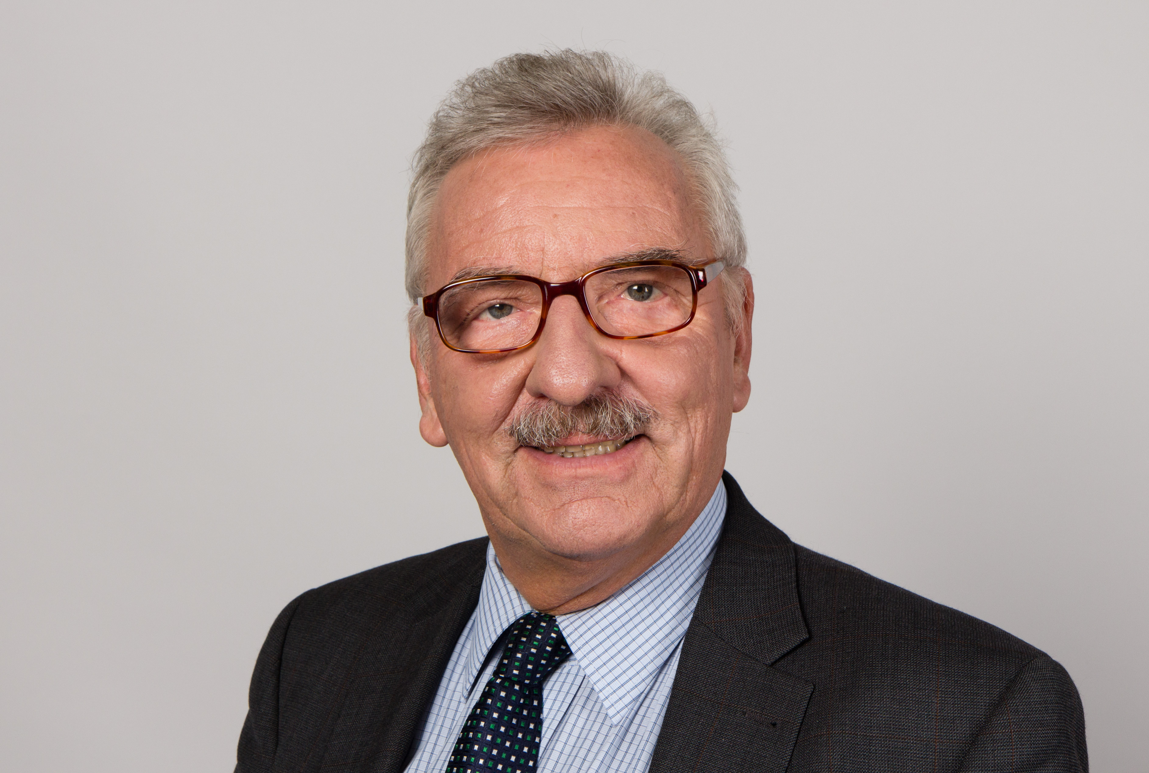 Jürgen Klimke (* 2. Juli 1948 in Hamburg) ist ein deutscher Politiker (CDU). Seit 2002 ist er Mitglied des Deutschen Bundestages. Wikipedia-Bundestagsprojekt 2014 8–12 September 2014 in BerlinThis file was taken during the project “Wiki loves parliaments/Bundestag 2014” (German). Organisation: Martin Rulsch, Olaf KosinskyDesign: Martin KraftPhotography: Foto-AG Gymnasium Melle (Jan-Kristof Blömke, Lukas Eismann, Moritz Kosinsky, Laura Lessing, Karsten Mosebach, Mascha Mosebach, Teresa Schreer, Noah Sewöster, Niklas Tschöpe), Olaf Kosinsky, Martin Kraft, Harald Krichel, Steffen Prößdorf, Ralf Roletschek, Martin Rulsch, Gerd Seidel, Sven TeschkeVideo: Marc Rudnick, Manuel SchneiderEditors: Marcus Cyron, Günter Fremuth, Martin Kraft, Robin Krahl, Harald Krichel, Martin Rulsch, WikiAnikaReception: DasMonstaaa, Leonie Rabea Große, Lutheraner, Nina Möllering, Martin Rulsch, WikiAnika, Foto-AG Gymnasium MelleCosmetics: Regina Bosak, Bettina Dieguez, Sandra Kobbe, Andrea Strehlke; Irada Abdullayeva, Vivien Abelmann, Olena Engelbrecht, Sarah Fabini, Nina Magnus, Jacqueline Schmidt, Leonie Taboada, Julia Willer Usage information If you need more information how to use this file, please send an email to . Personality rights warningAlthough this work is freely licensed or in the public domain, the person(s) shown may have rights that legally restrict certain re-uses unless those depicted consent to such uses. In these cases, a model release or other evidence of consent could protect you from infringement claims.